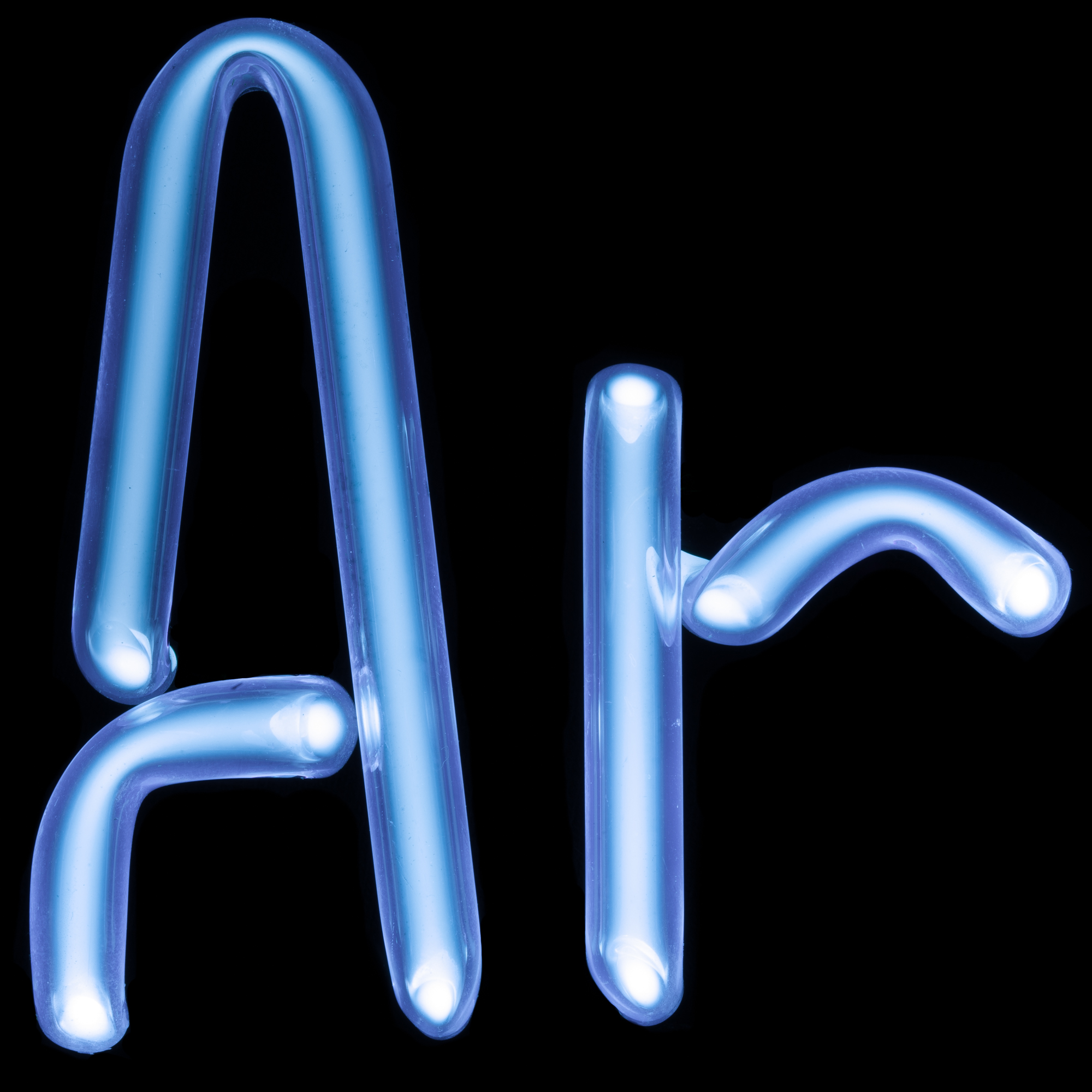 填充着氩气和少量汞蒸气的灯管